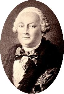 Portrait of Paul-François de Galluccio, marquis de L'Hôpital, ambassadeur de France en Russie[1] Jacques-Joachim Trotti de La Chétardie